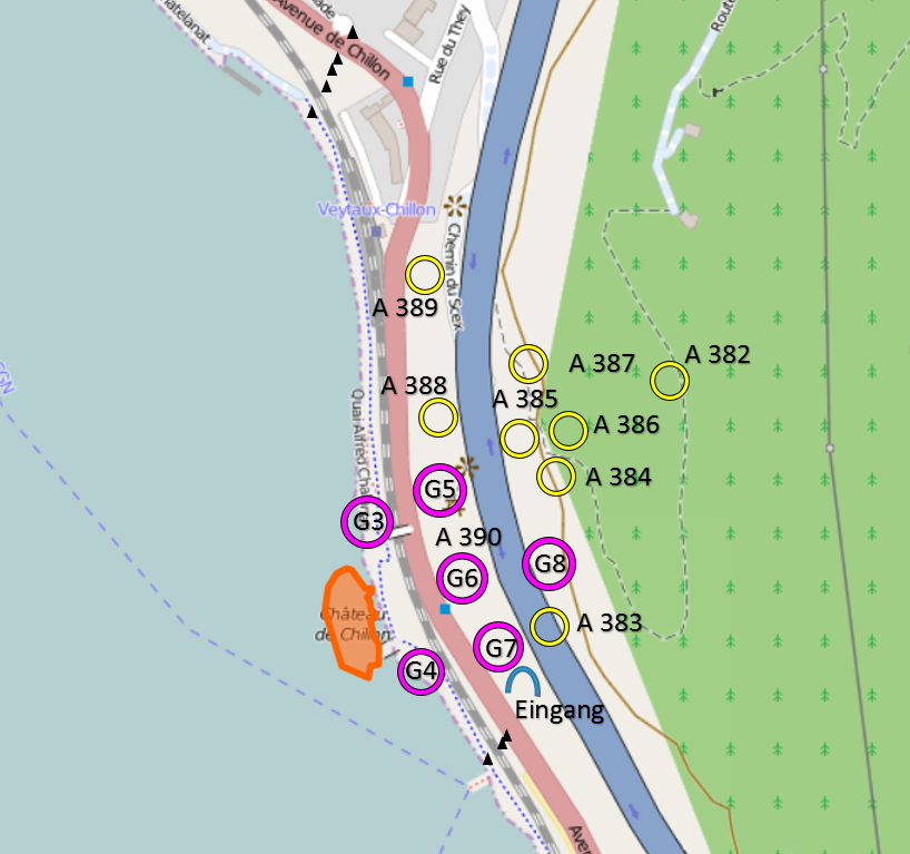 Sperrstelle Chillon, Veytaux VD, Schweiz